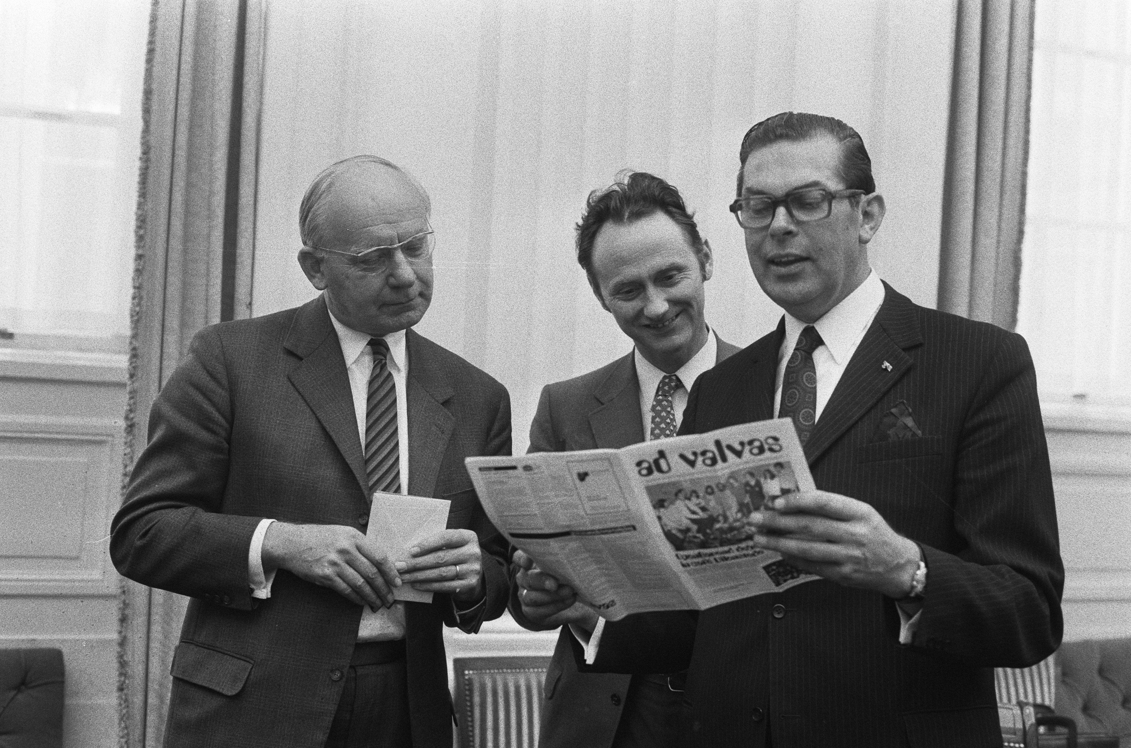 Collectie / Archief : Fotocollectie Anefo Reportage / Serie : [ onbekend ] Beschrijving : Tweede Kamer : antwoord van regering, v.l.n.r. Vondeling, minister Boersma , Biesheuvel met blad Ad Valvas Datum : 14 oktober 1971 Trefwoorden : politiek Persoonsnaam : Ad Valvas Fotograaf : Verhoeff, Bert / Anefo Auteursrechthebbende : Nationaal Archief Materiaalsoort : Negatief (zwart/wit) Nummer archiefinventaris : bekijk toegang 2.24.01.05 Bestanddeelnummer : 925-0472